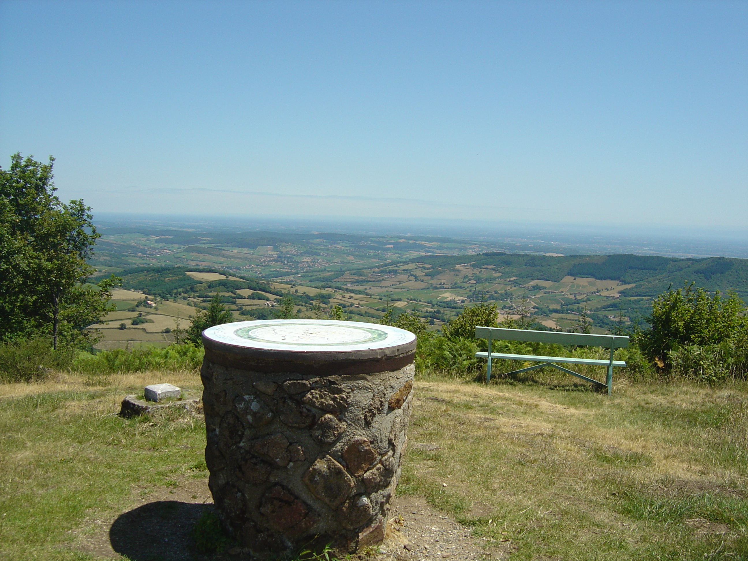 Table d'orientation et borne géodésique du signal de la Mère Boîtier (758m). Vue en direction de l'Est